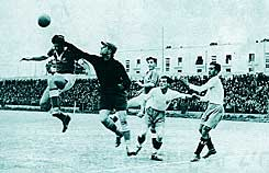 ישראל מול יוון במשחק בתל אביב במוקדמות מונדיאל 1938